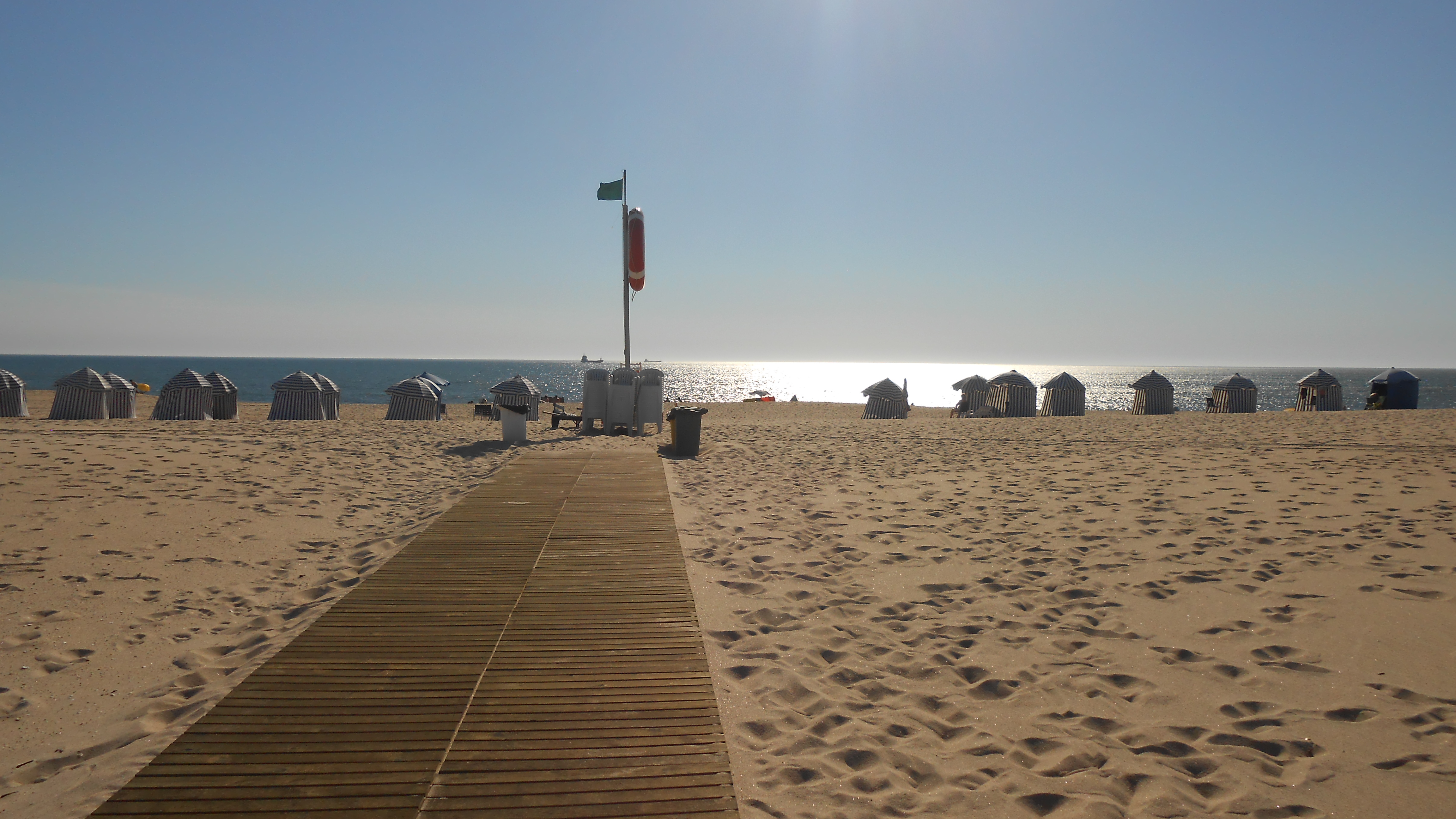 À tarde na Praia da Claridade, a Praia do Relógio na Figueira da Foz.